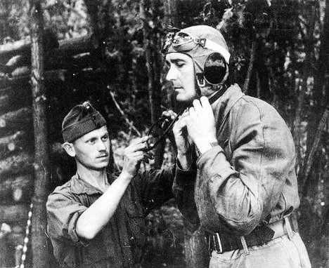 Horthy István, (1904 – 1942) magyar pilóta